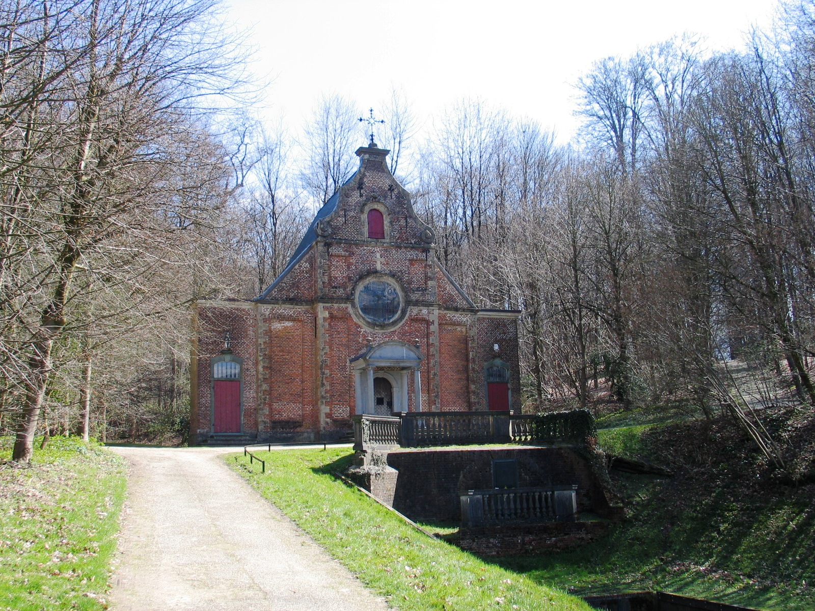 Sint-Gertrudiskapel van het kasteel te Gaasbeek - eigen foto